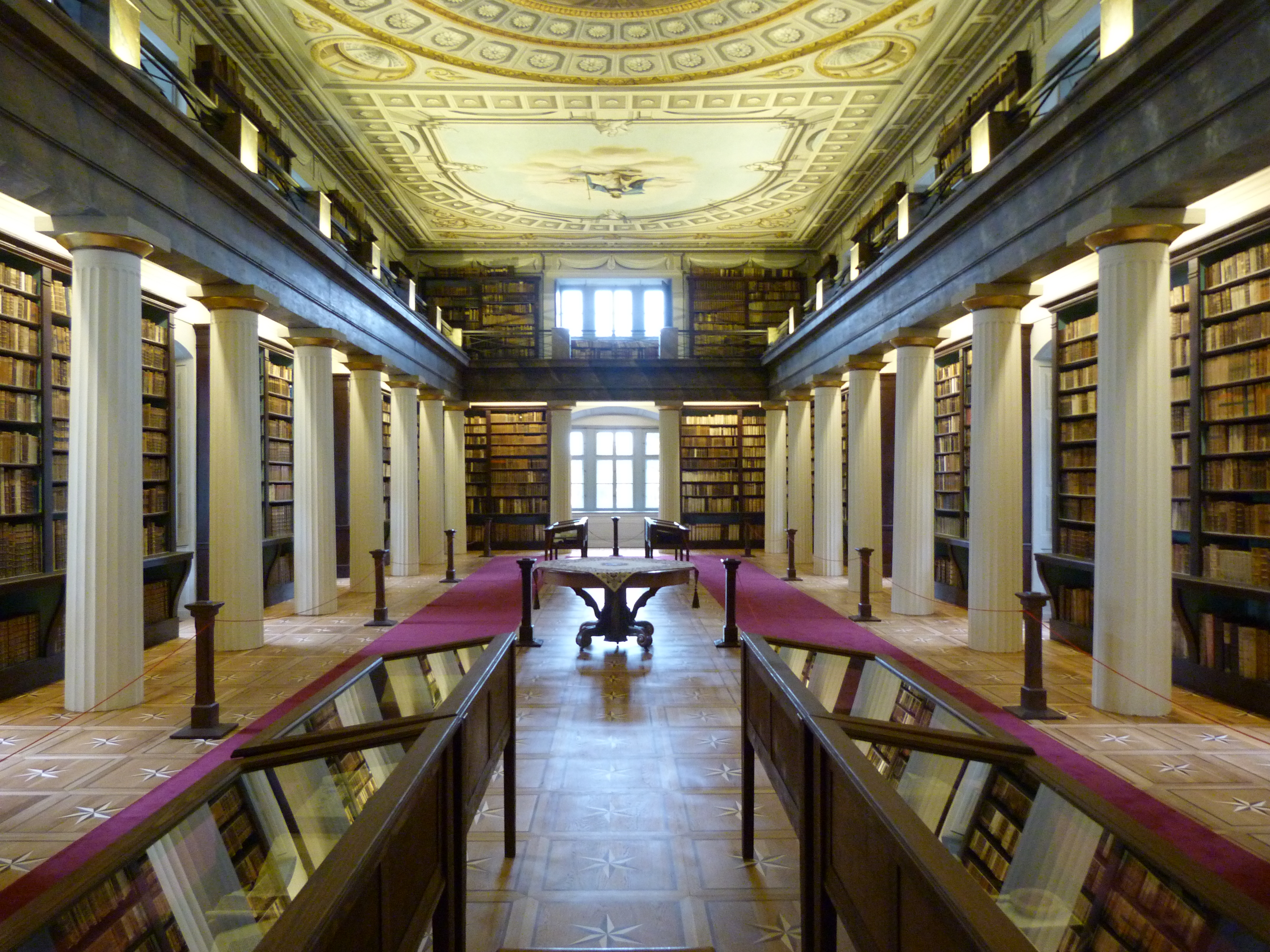 A felvétel 2014. április 9 –én, szerdán készült Sárospatakon. Sárospataki Református Kollégium Könyvtára, Iskola Múzeum. ©© Derzsi Elekes Andor, Budapest, 2014, A kép és filmfelvételek egészben, vagy részletekben másolását, bármilyen úton történő sokszorosítását és felhasználását a szerző ellenérték nélkül, jogutódjaira is kihatóan megengedi. Az engedély kiterjed a kereskedelmi célú hasznosításra is. Kéri azonban nevének feltüntetését a felhasználás során. A Metapolisz sorozat valamennyi képe és filmje Creative Commons alatti valamint kereskedelmi - for profit - célra is felhasználható. Ajánlott hivatkozás: Derzsi Elekes Andor: Metapolisz DVD line